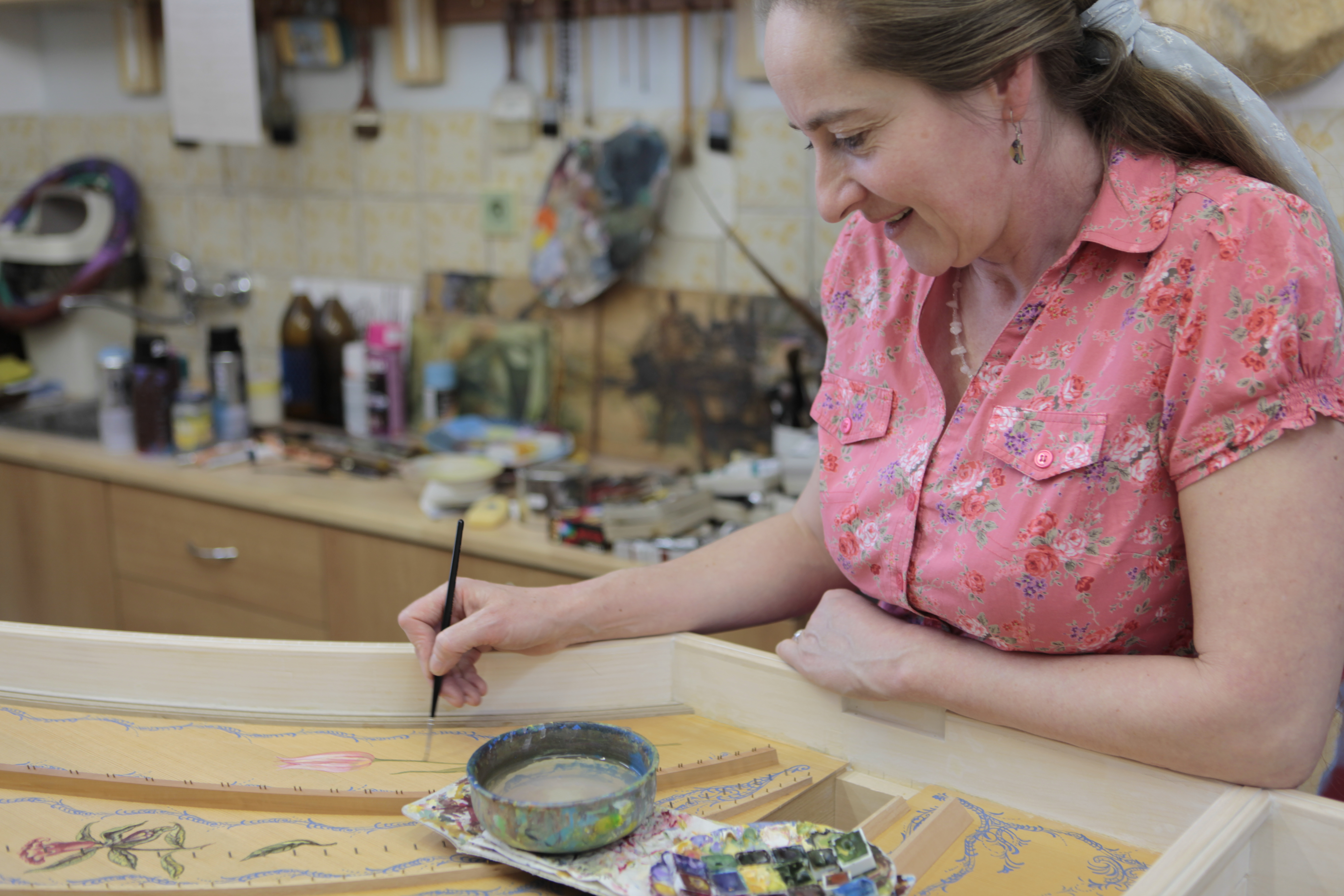 Miluše Poupětová, cembalo francouzského typu, foto: Vít Švajcr Dobré světlo.com.